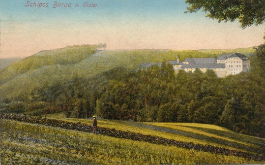 Sicht vom Wachtelberg auf Schloss Berga um 1912